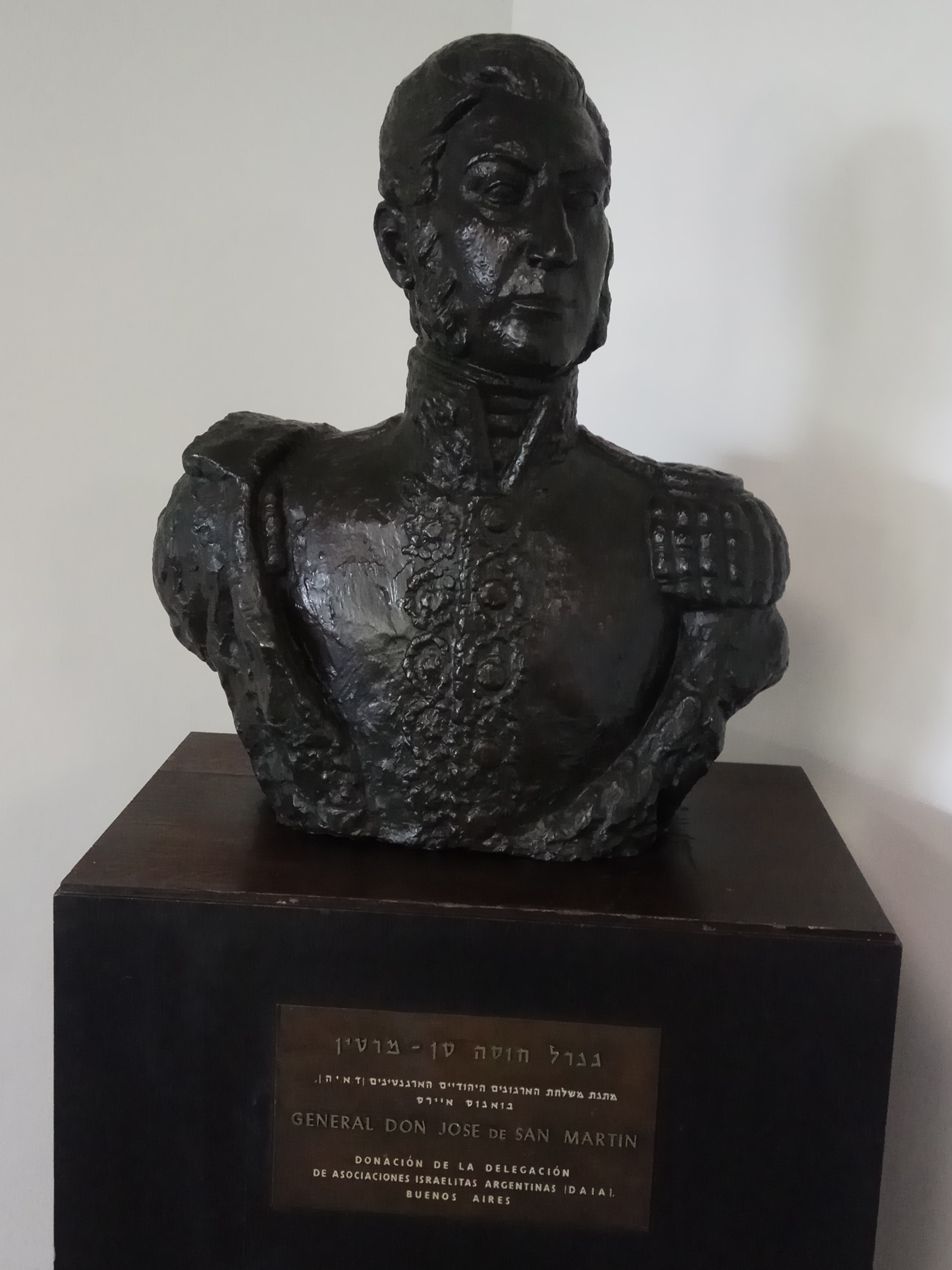 פסל של חוסה דה סן מרטין במכון ויצמן ברחובות